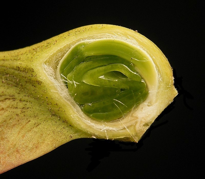 Acer pseudoplatanus